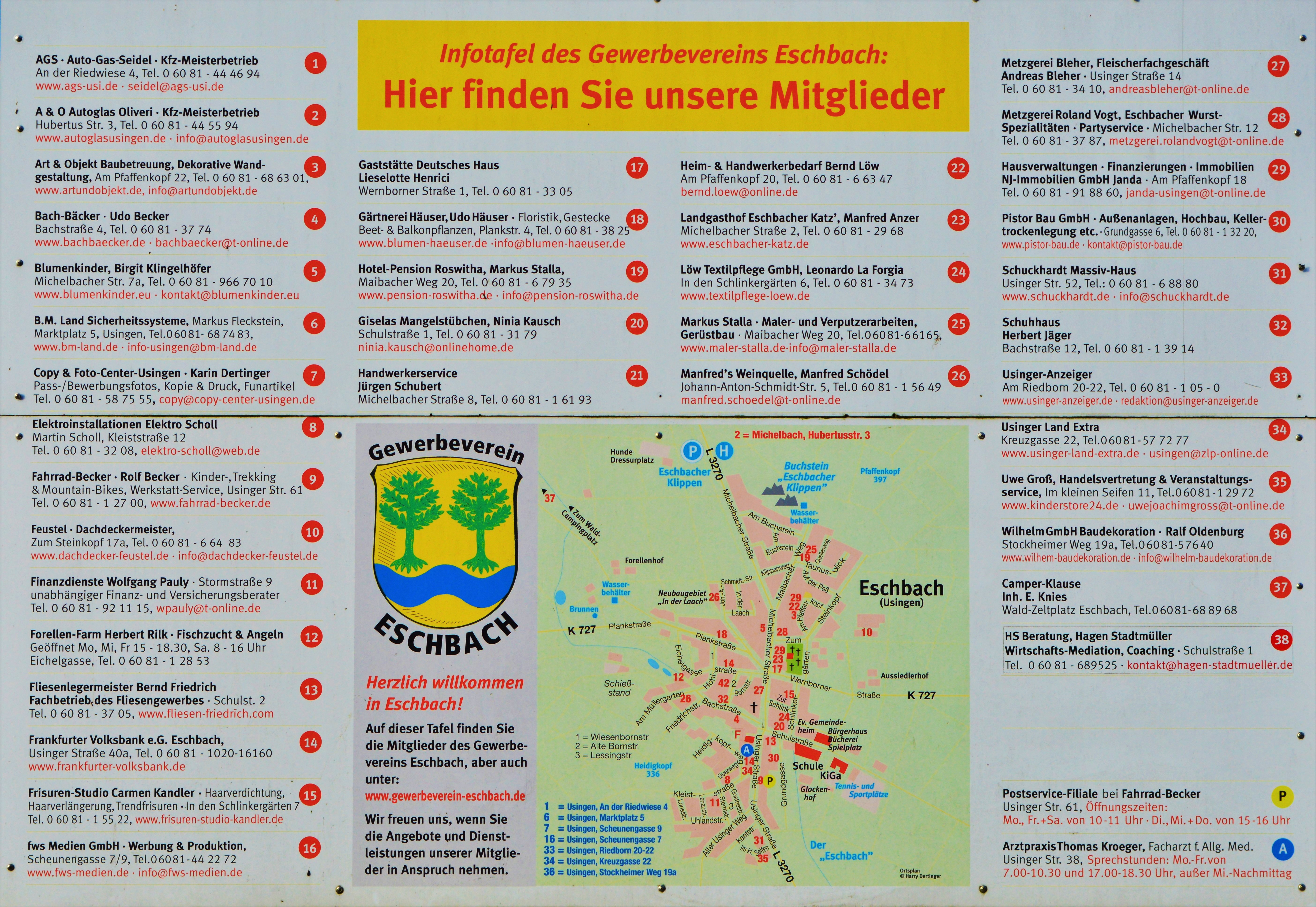 Informationstafel über Eschbacher Gewerbe an Ortsrand Richtung Usingen